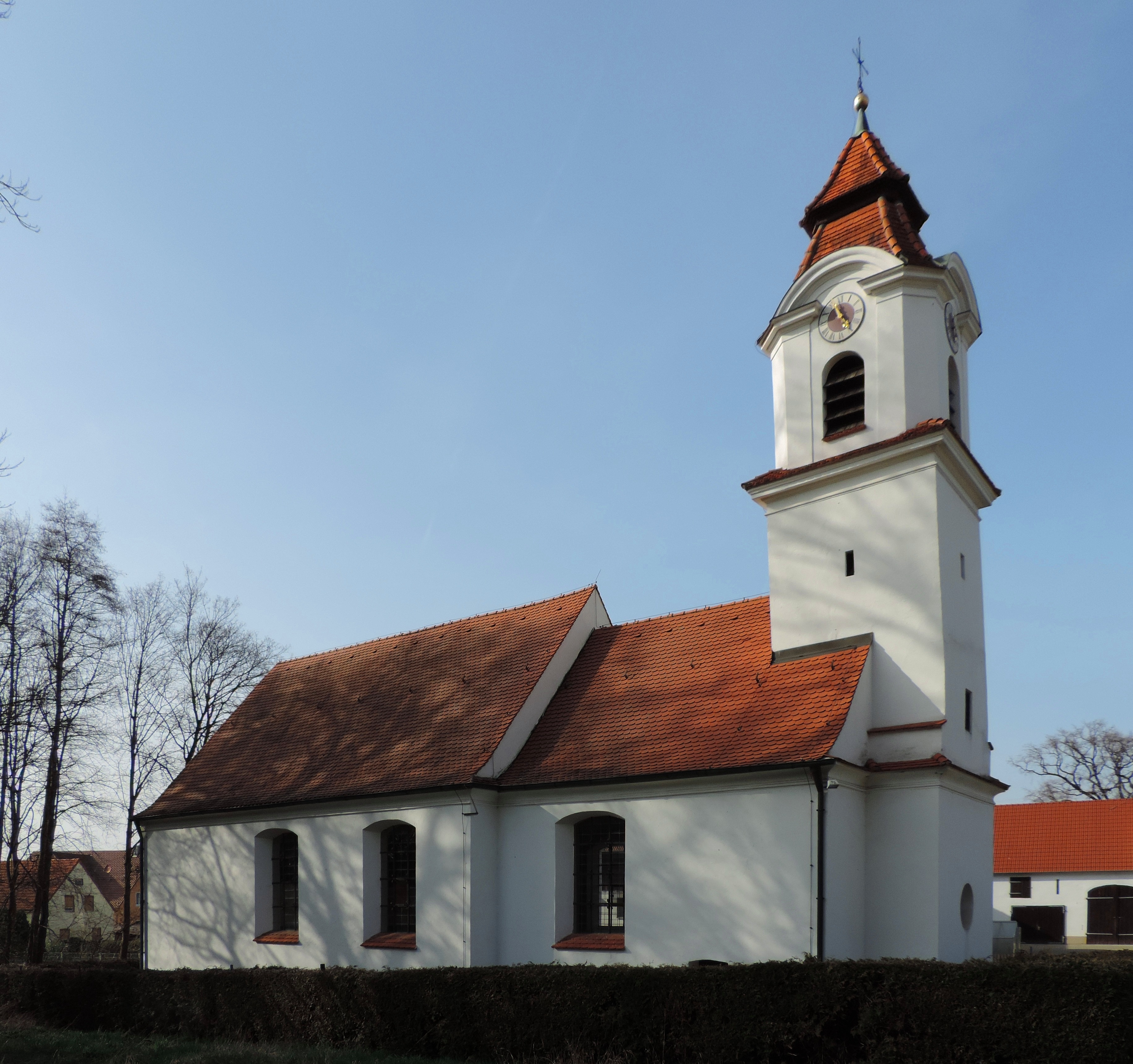 Unterbaar, kath. Kirche St. Margareta